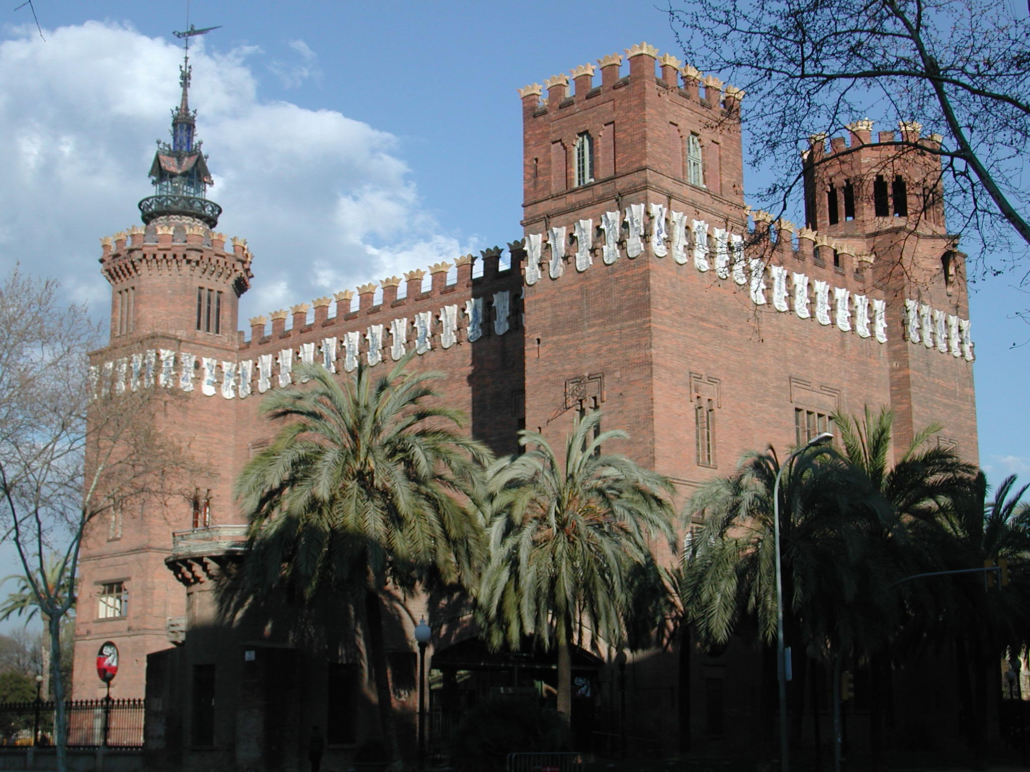 Castell dels tres Dracs Barcelona.